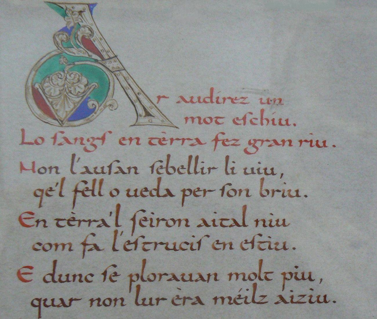 Detall d'un manuscrit de la Cançó de Santa Fe, un poema occità del segle XI. El manuscrit sencer consta de 36 pàgines de 35cm x 22'5cm disposades per parells en 19 pergamins. Encara que avui ens pugui semblar molt treballat, sembla que va ser escrit per a una funció pràctica, i no com a objecte decoratiu. De fet, es van descuidar de pintar l'interior de la cantonada d'una L. Actualment es pot visitar a l'interior de l'església abadial de Concas. La cançó era cantada i ballada a l'abadia de Concas, com a acte extern a les misses ordinàries. Uns versos de la mateixa cançó expressen el desig que aquesta fos donada a conéixer a d'altres contrades.